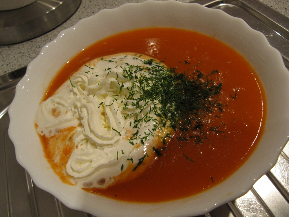 Hummersuppe mit Sahne und Dill, typisch für Hamburg